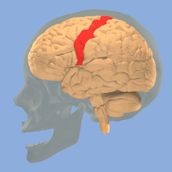 precentral gyrus.